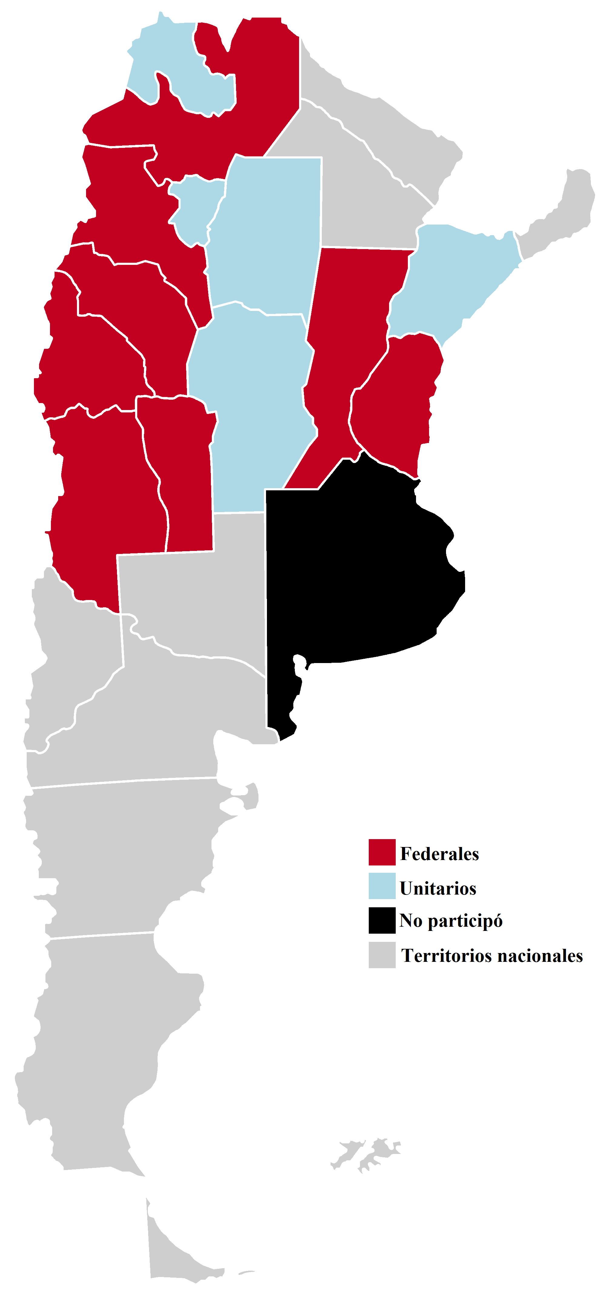 Resultado de la elección presidencial de Argentina de 1860 por provincia.